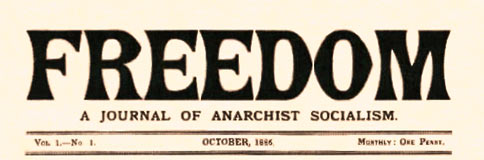 Freedom est un journal anarchiste fondé à Londres en octobre 1886 par Charlotte Wilson et Pierre Kropotkine.